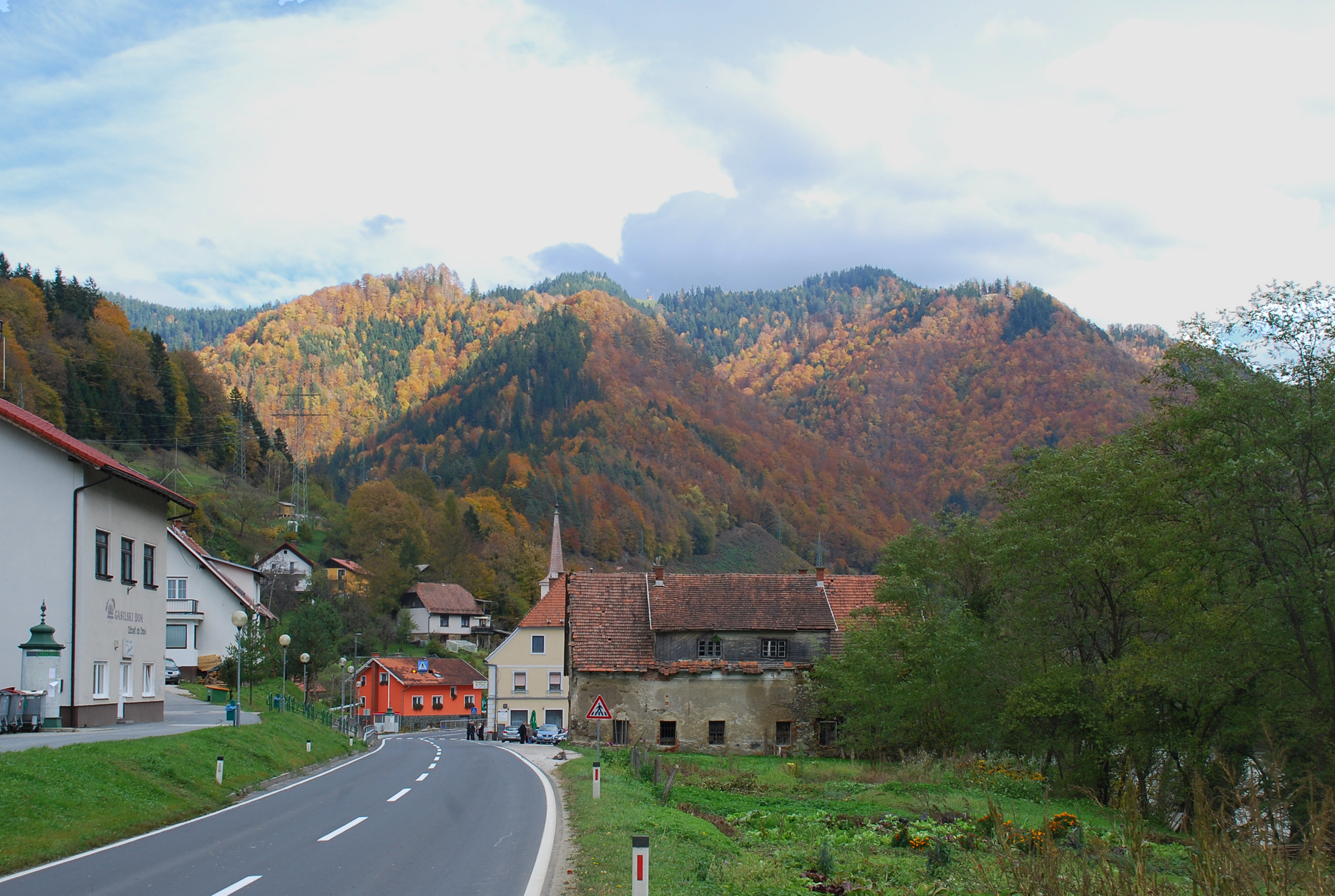 westliche Ortseinfahrt von Ožbalt (St. Oswald im Drauwald, St. Oswald an der Drau), Slowenien